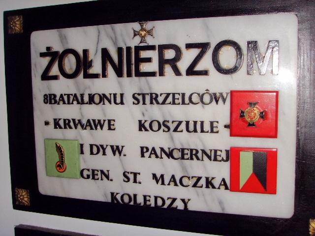 Tablica w kościele św. Andrzeja Boboli w Londynie